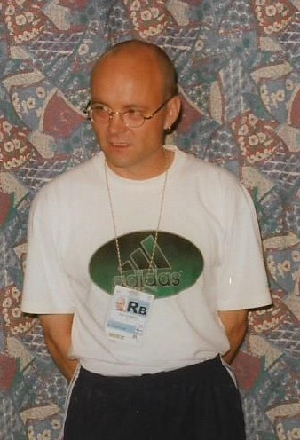 Tapio Suominen Suomen joukkueen mitalikahvitilaisuudessa yleisurheilun Euroopan-mestaruuskilpailuissa Budapestissa 23. elokuuta 1998.